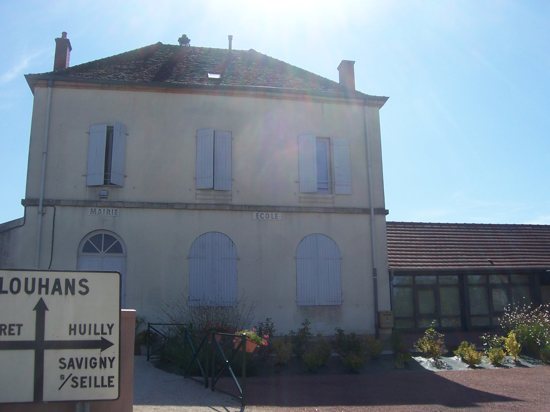 Mairie de La Frette